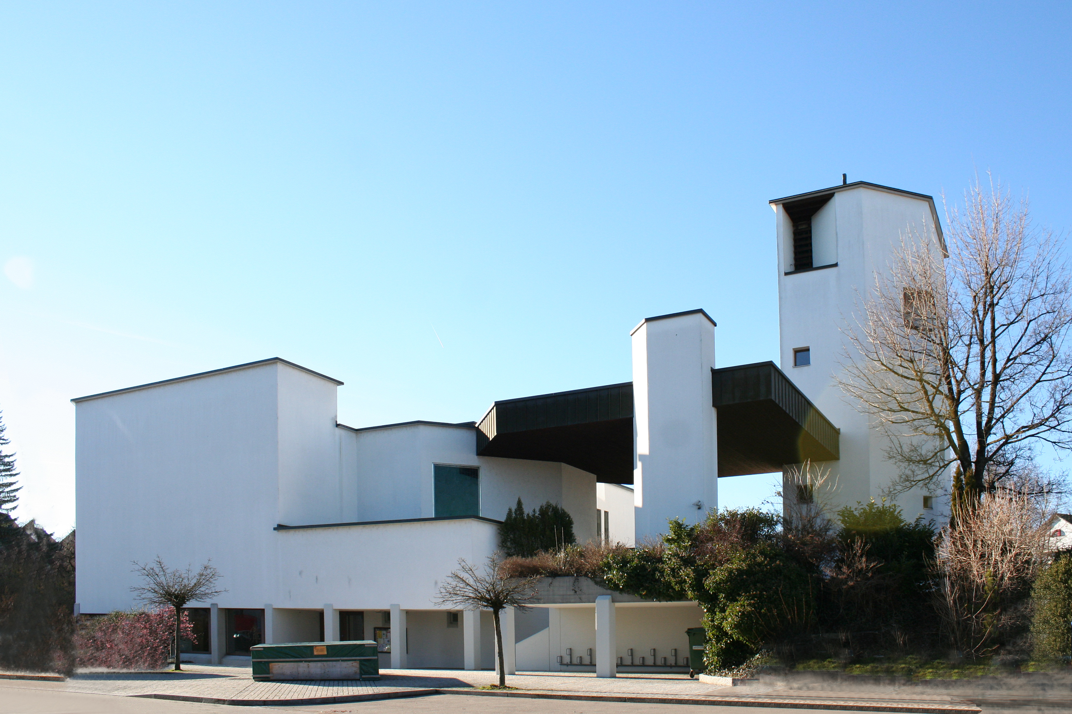 Römisch-katholische Pfarrikirche St. Niklaus Hombrechtikon, Ansicht von Südosten